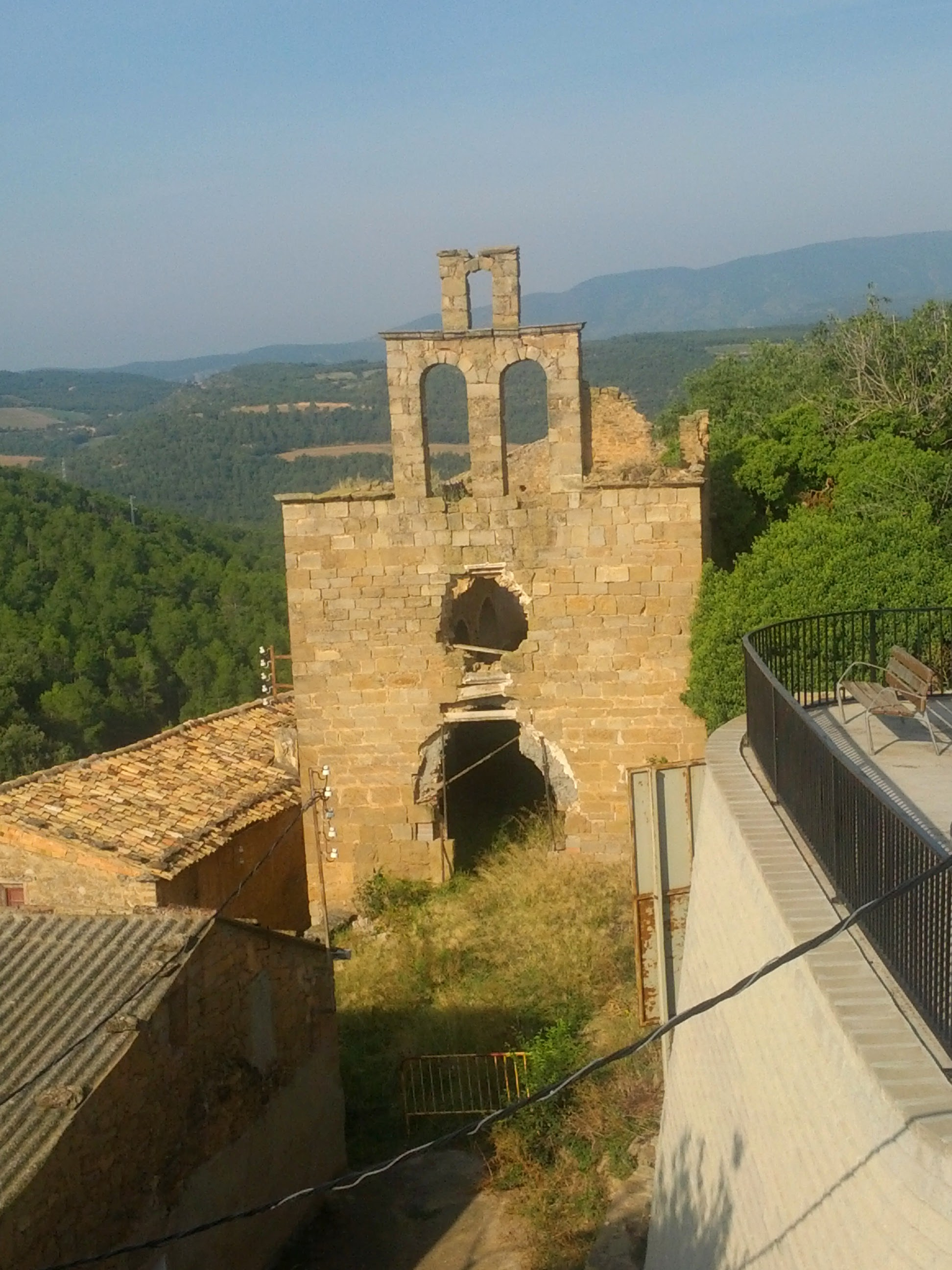 Esglèsia de Santa Maria de Montargull (Artesa de Segre)